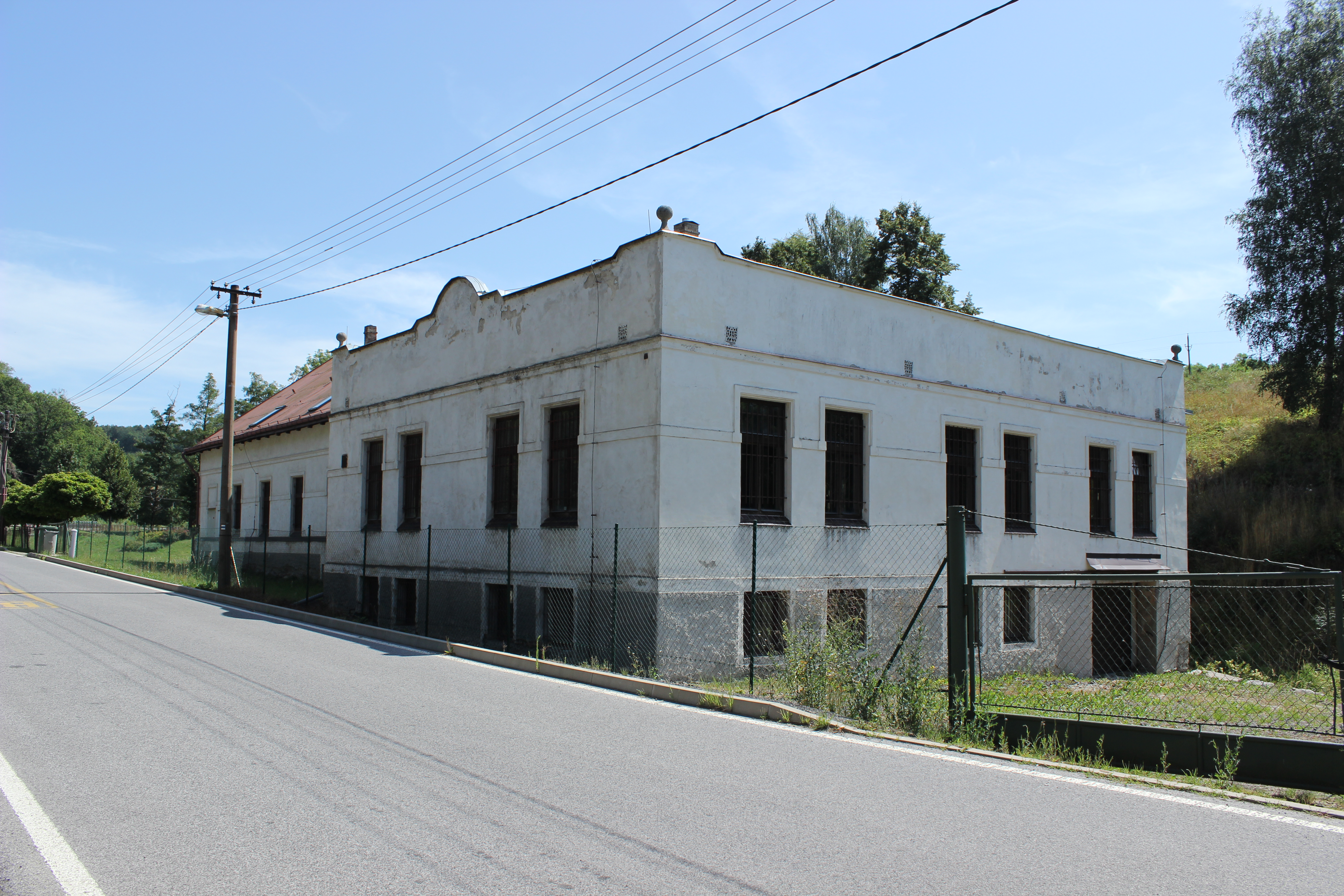 Objekt sklářské dílny Spider Glass v Heřmanicích, okres Liberec (dům číslo popisné 7).